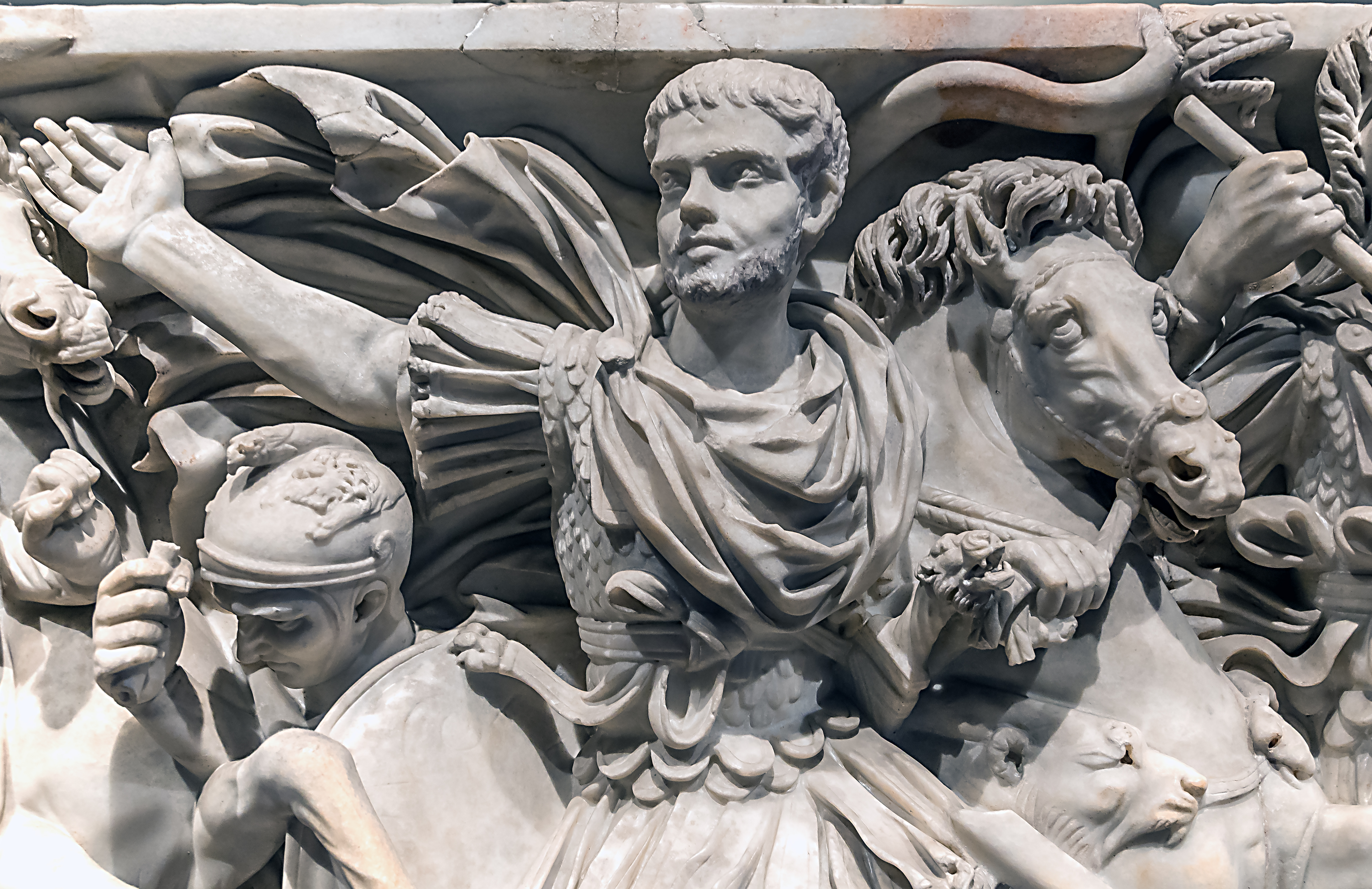 Die zentrale Gestalt des Verstorbenen auf der Frontseite des Sarkophags, dessen Gesicht möglicherweise in einer späteren Zeit überarbeitet wurde, zeigt nach Auffassung der modernen Forschung wahrscheinlich Herennius Etruscus, der im Jahr 251 in der Schlacht von Abrittus gegen die Goten gefallen war.